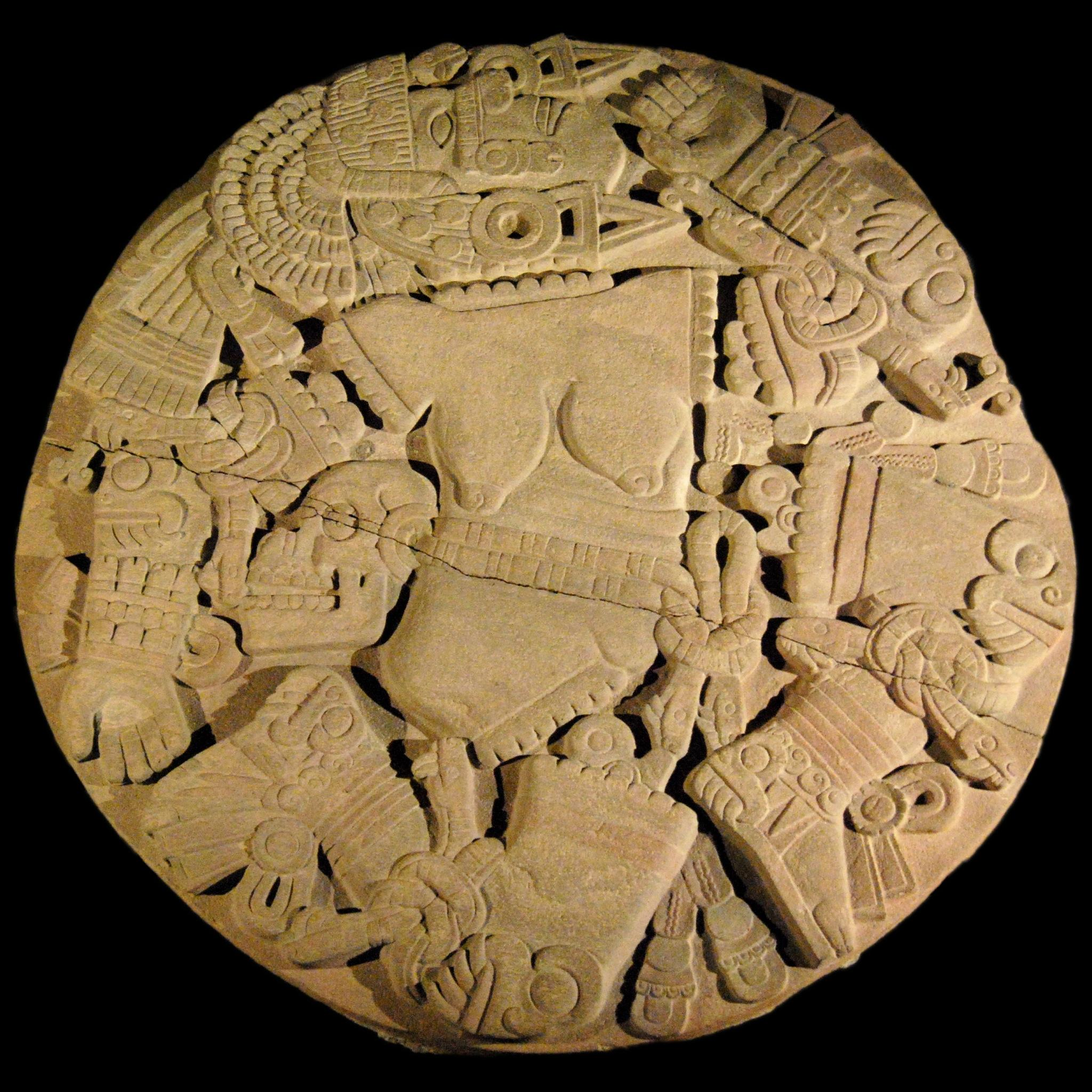 Coyolxauhqui